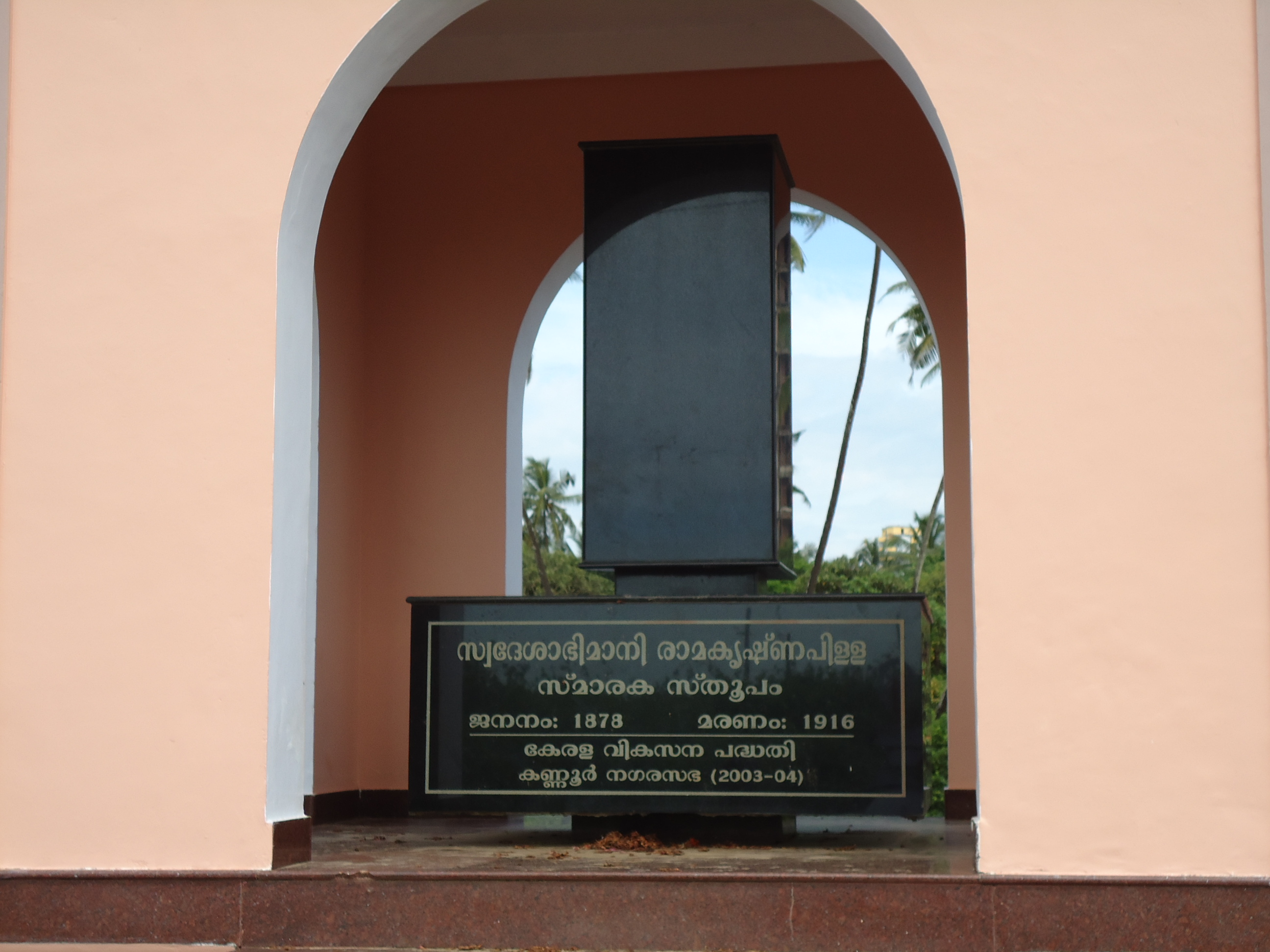 സ്വദേശാഭിമാനി രാമകൃഷ്ണപിള്ളയുടെ സ്മാരക സ്തൂപം